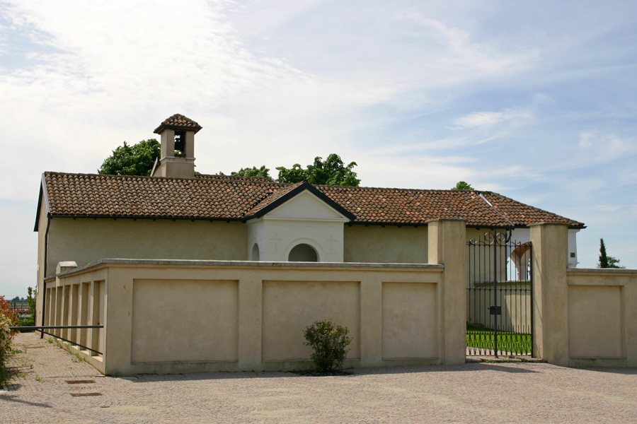 Santuario della Madonna del Latte di Gionzana (Novara), vista da nord